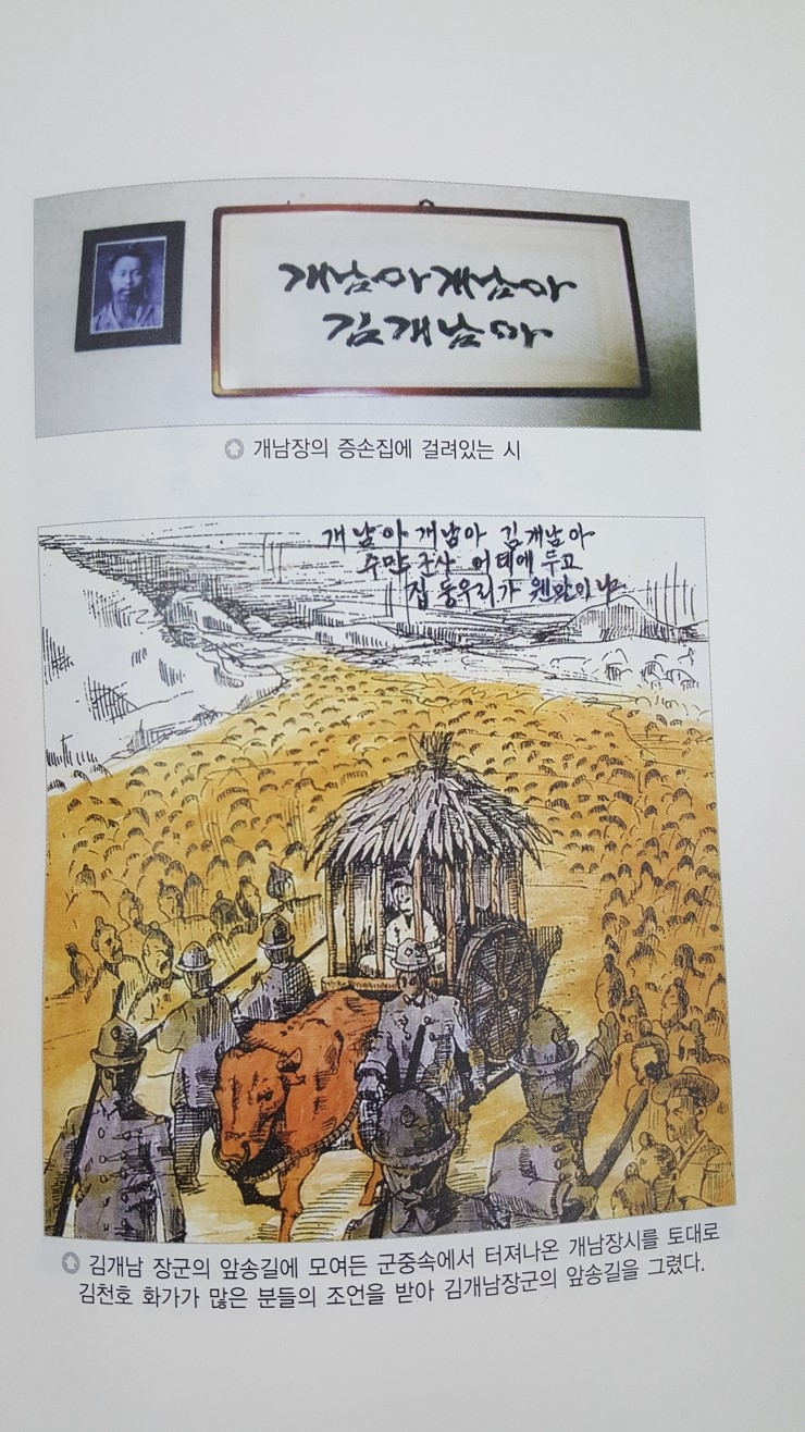 김개남이 끌려가는 장면